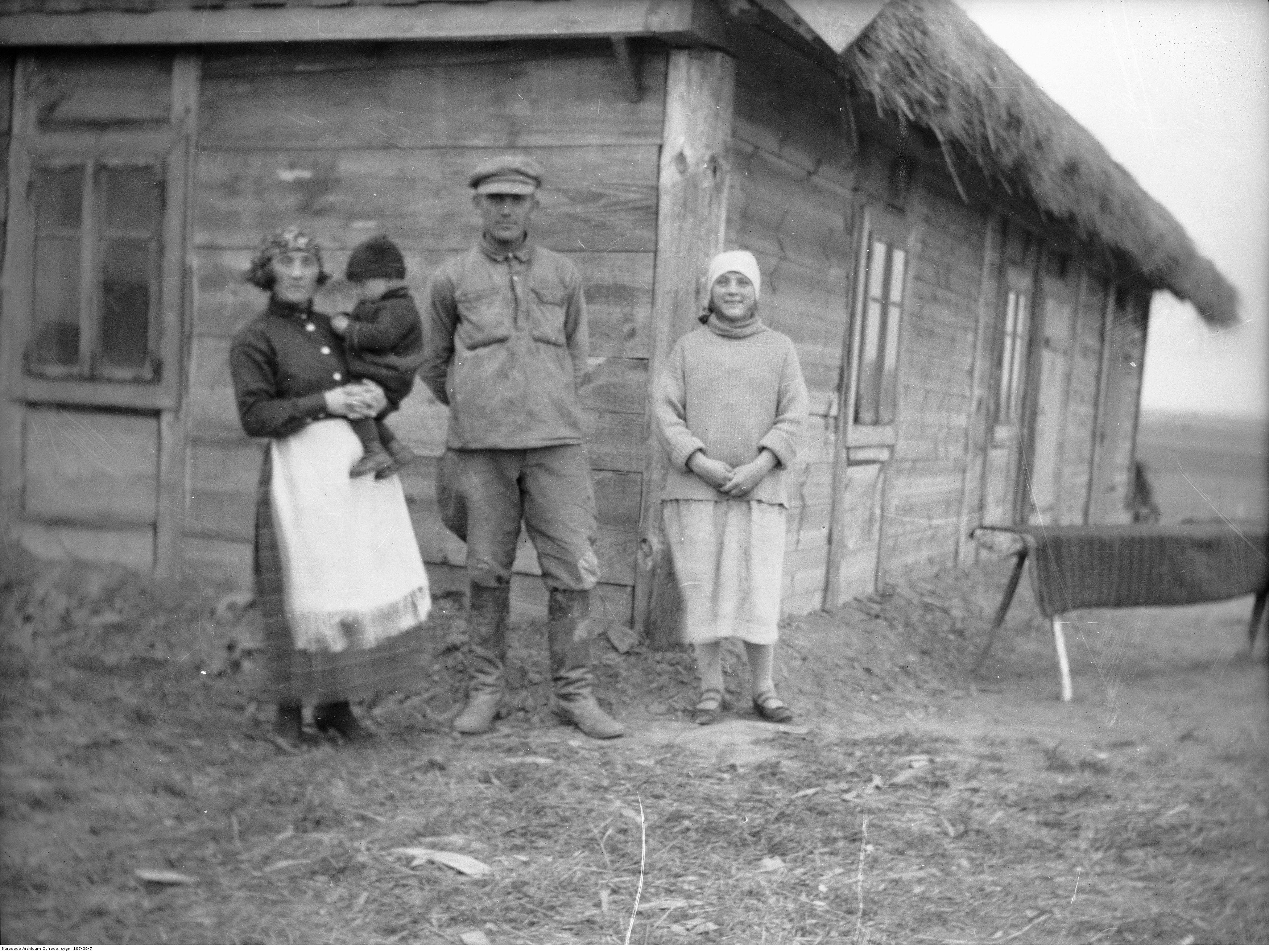 Osadnik wojskowy z rodziną przed domem.